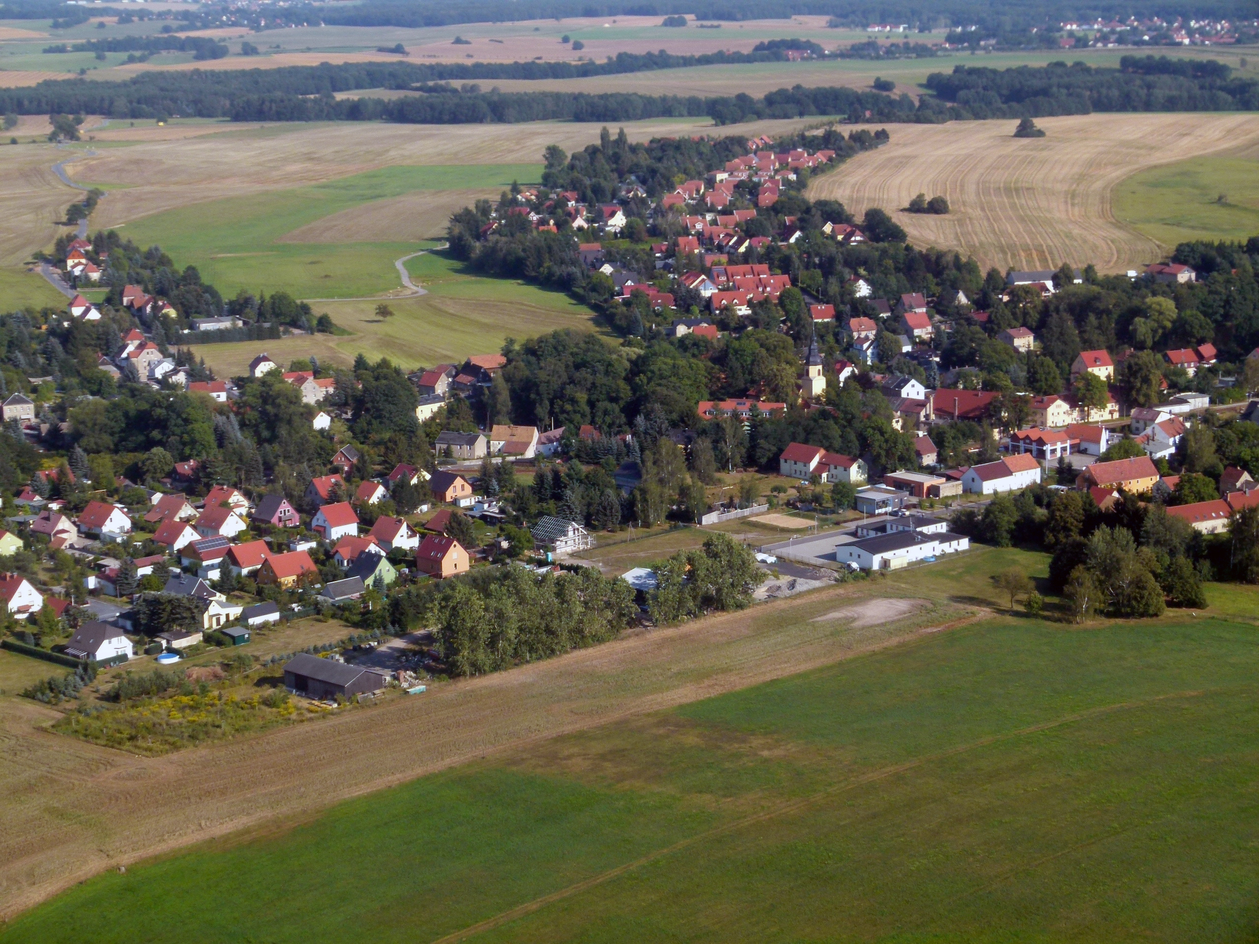 Blick auf den nördlichen Teil der Dresdner Gemarkung Lausa